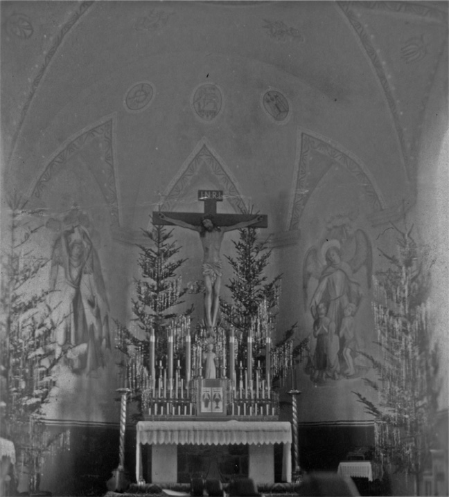 Stadtpfarrkirche Regen, Innenraum, vor Renovierung in den 1960er Jahren, vermutlich Mitte der 1950er Jahre